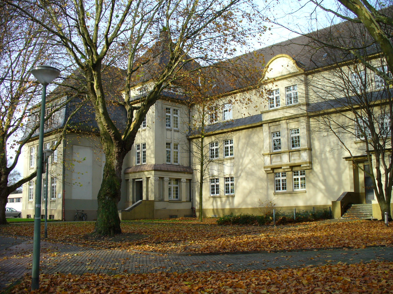 GGS Im Brömm, a primary school in Gelsenkirchen-Scholven, Germany